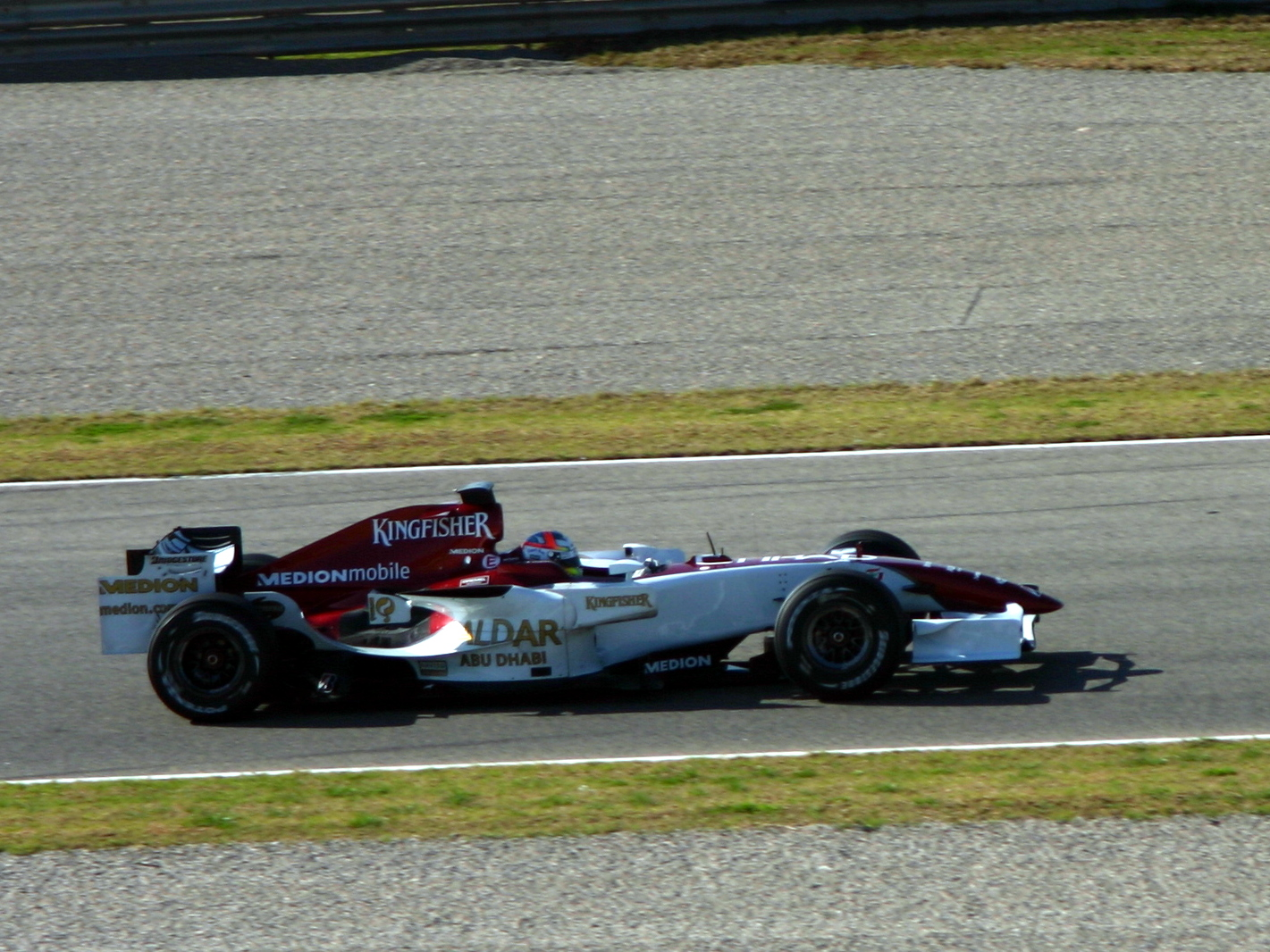 Adrian Sutil en los test realizados en el circuito de Cheste en Enero de 2008